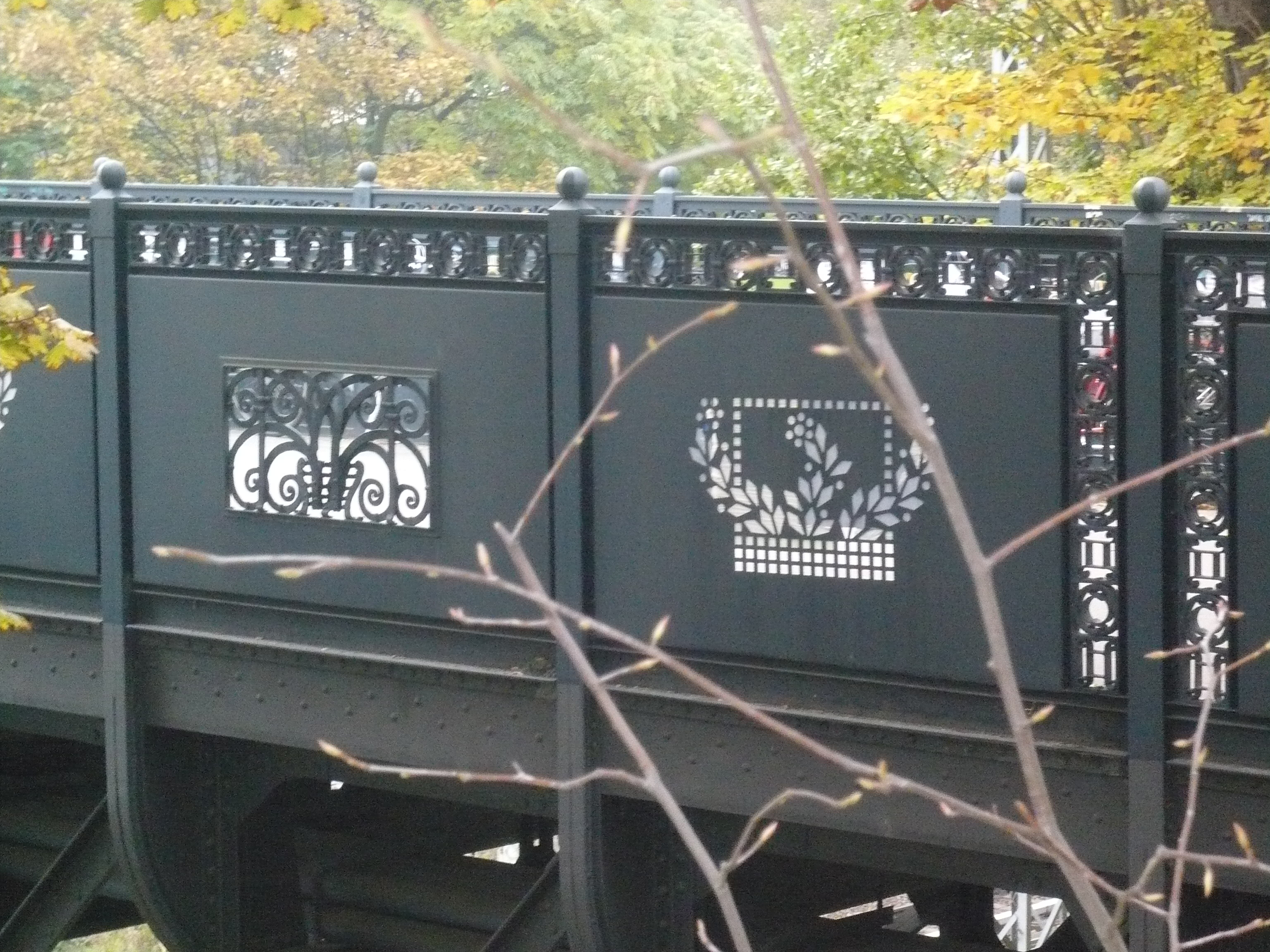 Greifenhagener Brücke: Geländerschmuck (2)